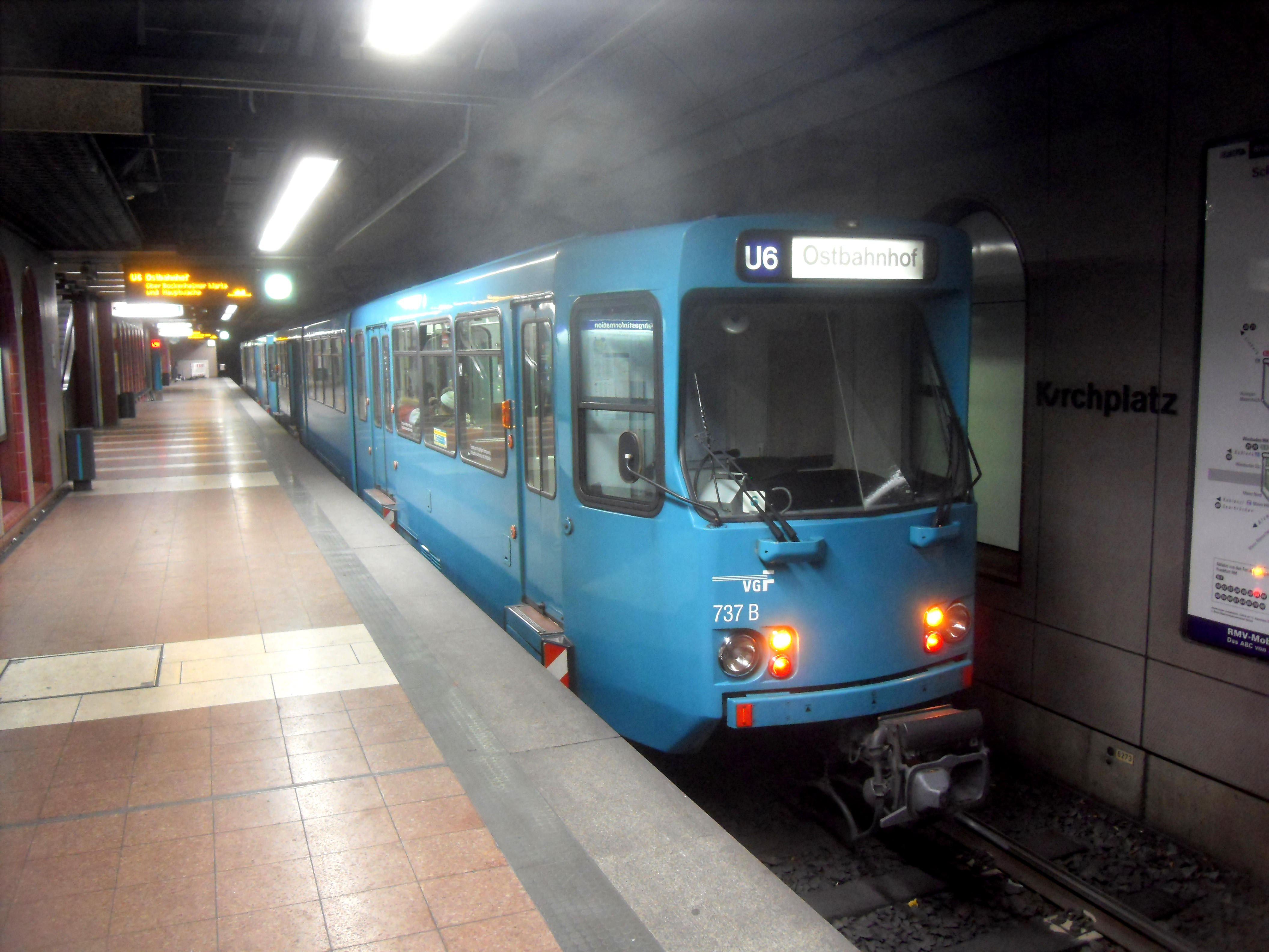 U-Bahn-Wagen des Types Ptb der U-Bahn Frankfurt am Main im U-Bahnhof Kirchplatz auf der Linie U 6 auf dem Weg nach Bahnhof Frankfurt (Main) Ost in Hessen (Deutschland)